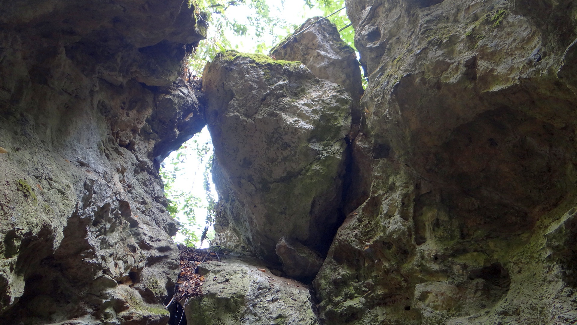 Komin Prawej Nogi Baby w skałach Dudnik w Podlesicach